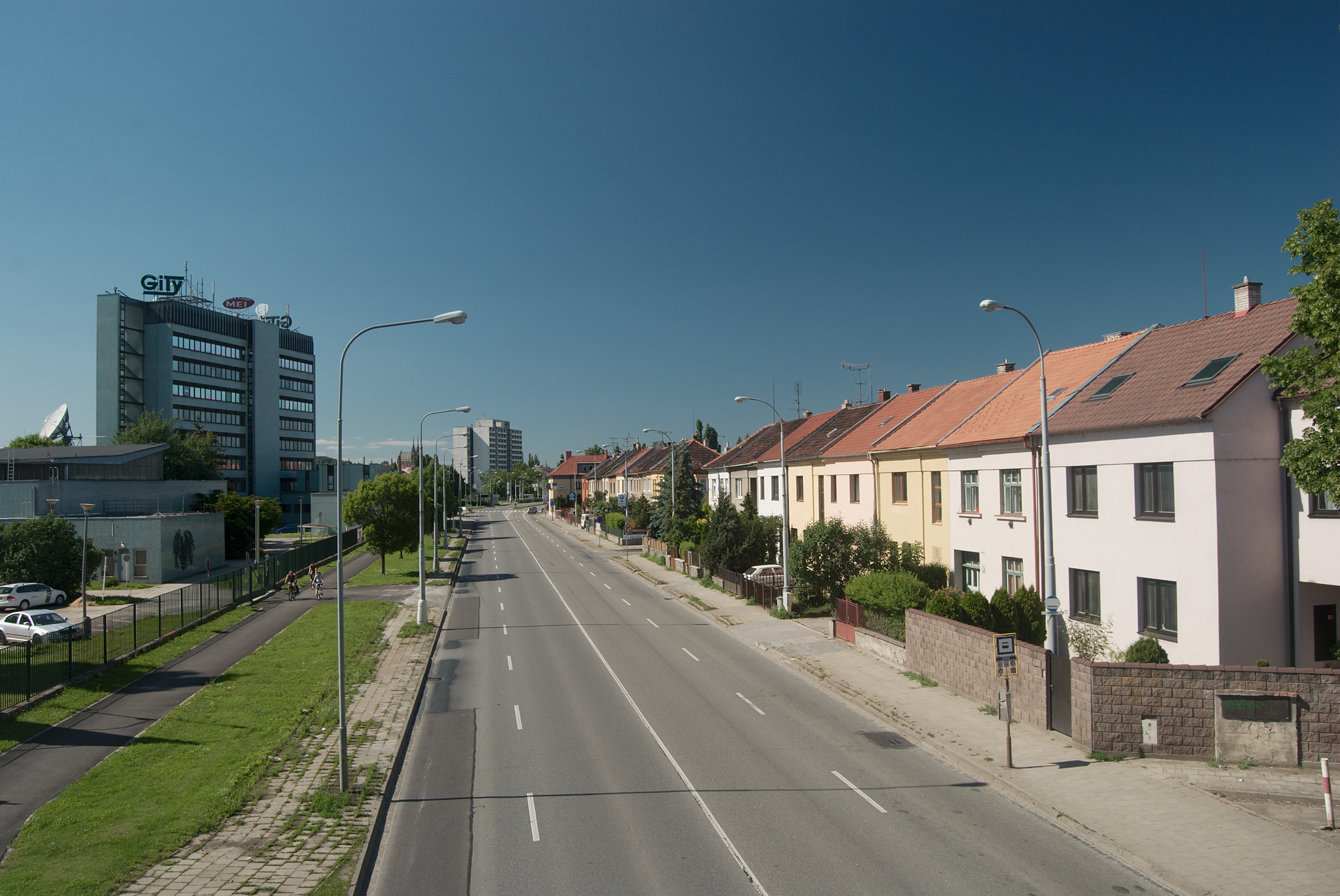 Brno-Komárov - centrum Komárova při Hněvkovského ulici, vyfotografované od jihu